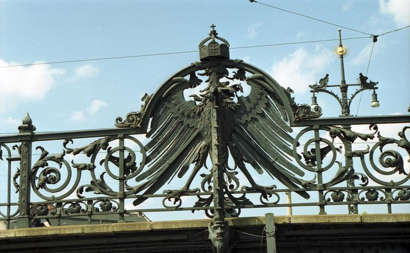 22.7.1991 Berlin-Mitte, Weidendamm-Brücke